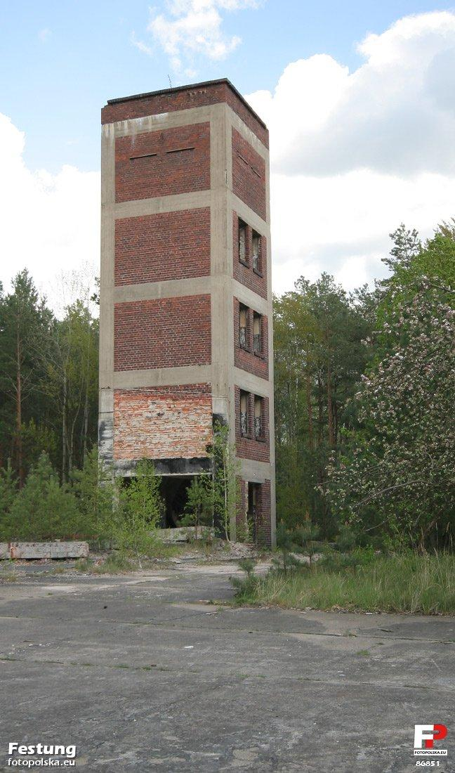 Ocalała wieża obserwacyjna w jednej, z rzekomo trzech jednostek straży pożarnej działającej na terenie fabryki. Wieża ta służyła także do suszenia węży gaśniczych.